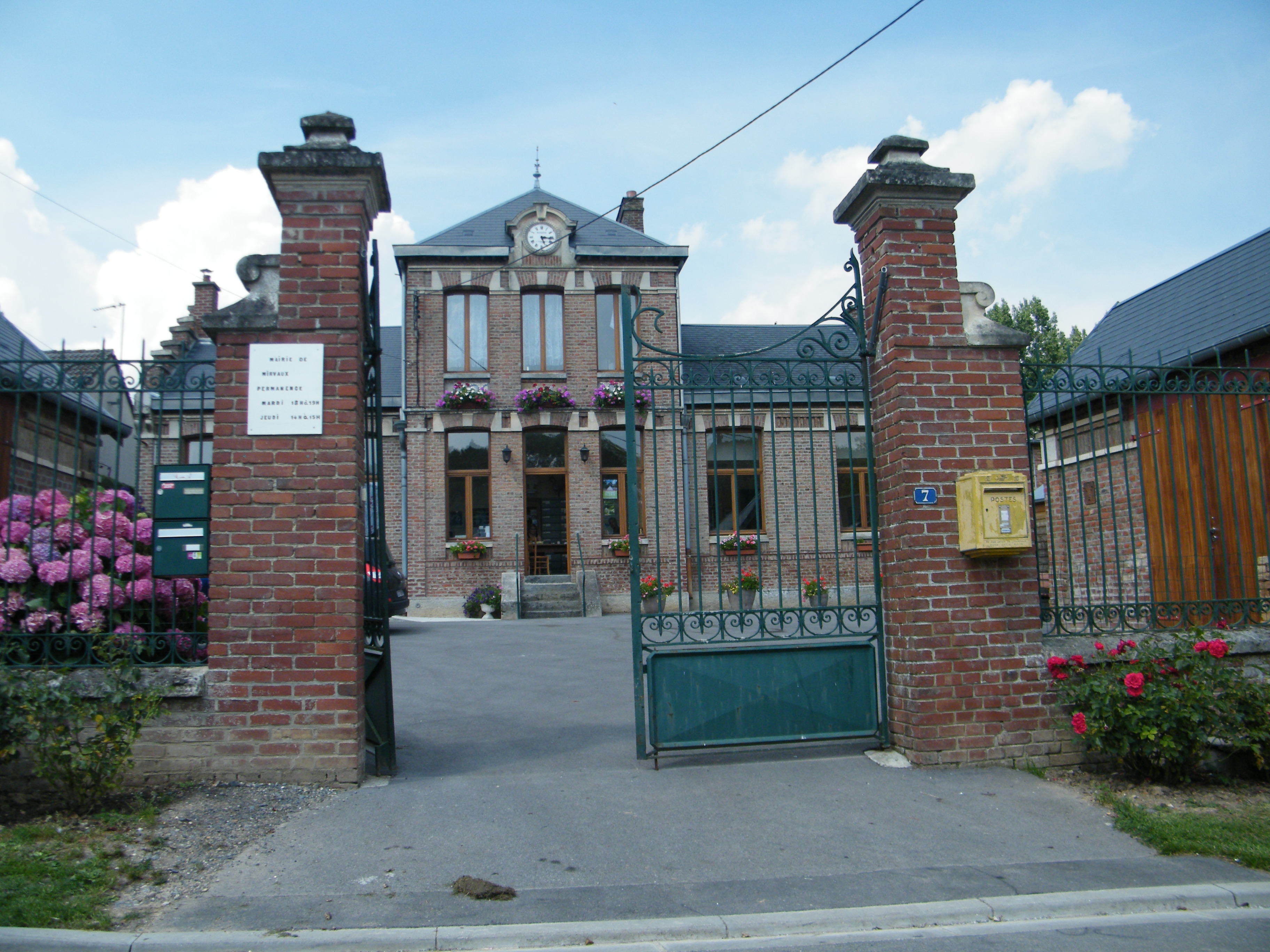 Mairie de Mirvaux, ancienne école.